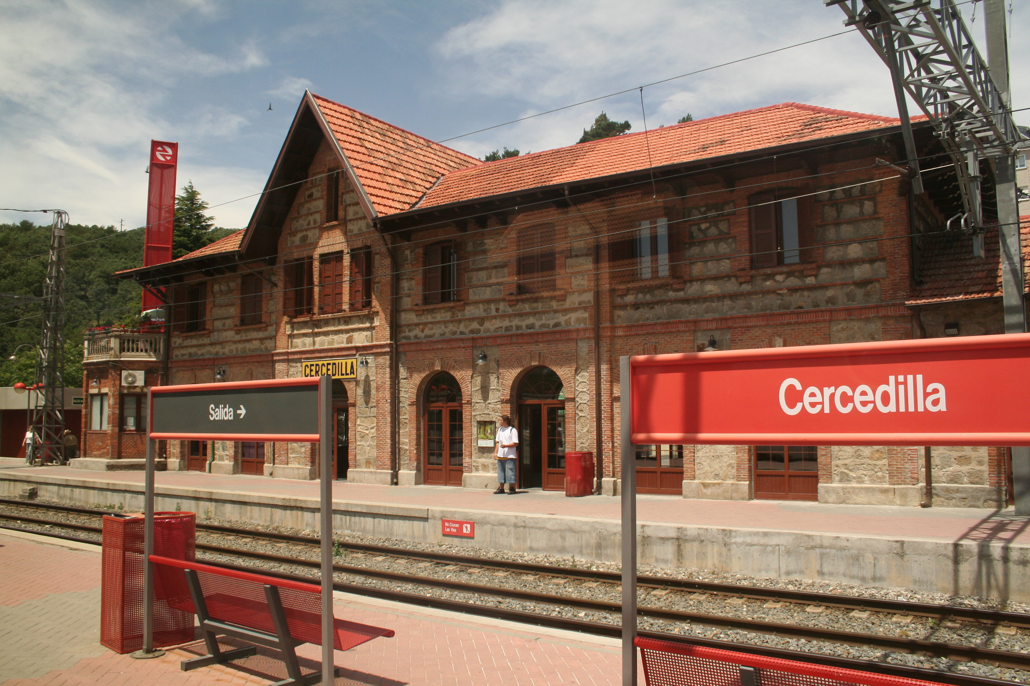 Estación de Cercedilla.